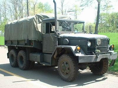 camion de l'armee americaine poids 6140KG avec une vitesse maximal de 89 KM/H